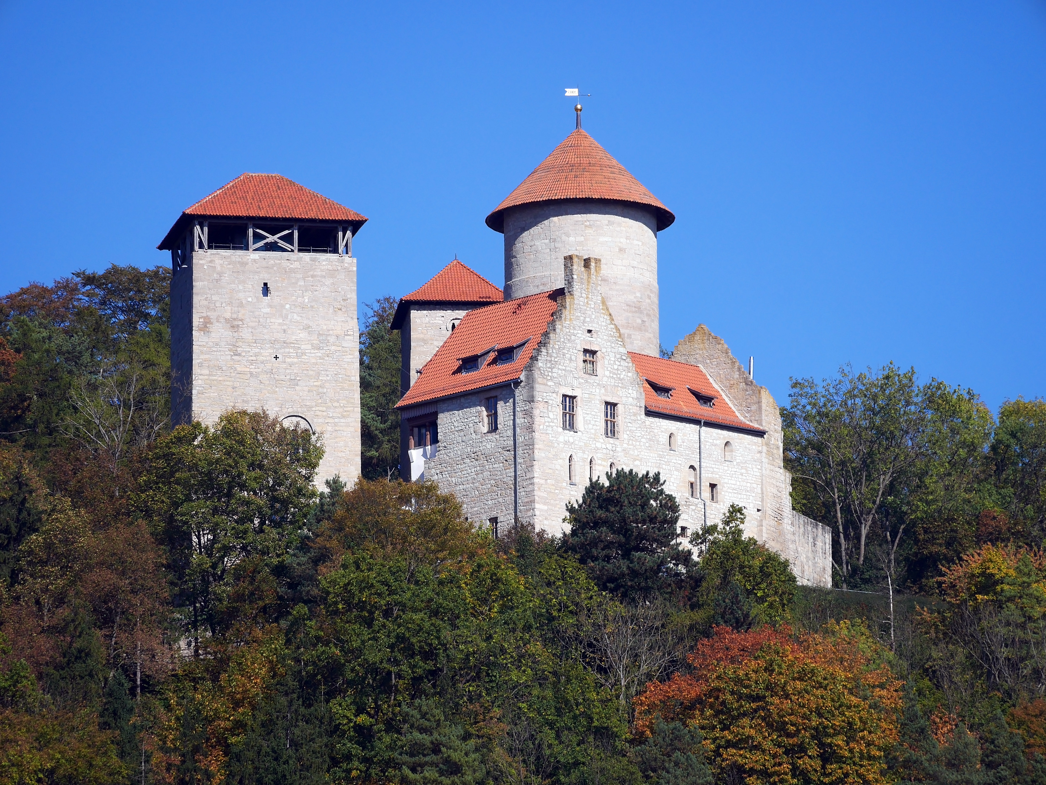 Die Burg Normannstein ist eine Spornburg oberhalb der thüringischen Stadt Treffurt an der Werra, unmittelbar an der Landesgrenze zu Hessen gelegen. Die ersten Bausten stammen aus dem 9. Jahrhundert. Die Herren von Treffurt bauten dann um 1200 die erste Anlage zur heutigen Burg um. Heute befindet sich die Burg im Besitz der Stadt Treffurt und dient als Museum.